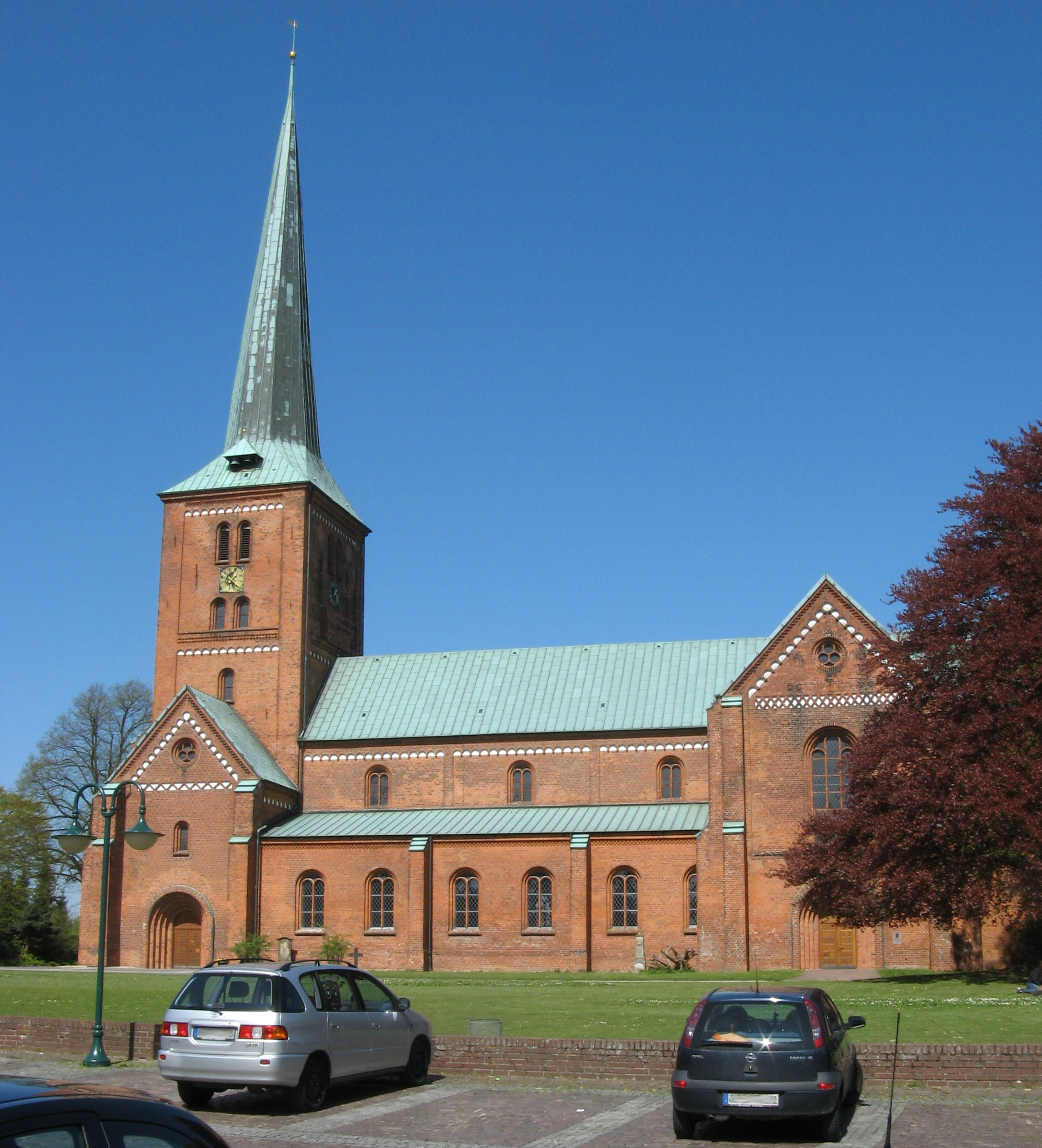 Die Marienkirche in Bad Segeberg